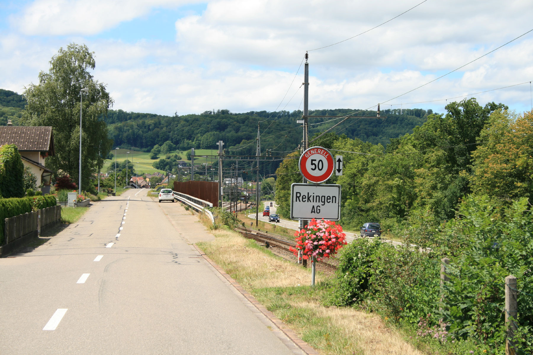 Rekingen AG, Switzerland